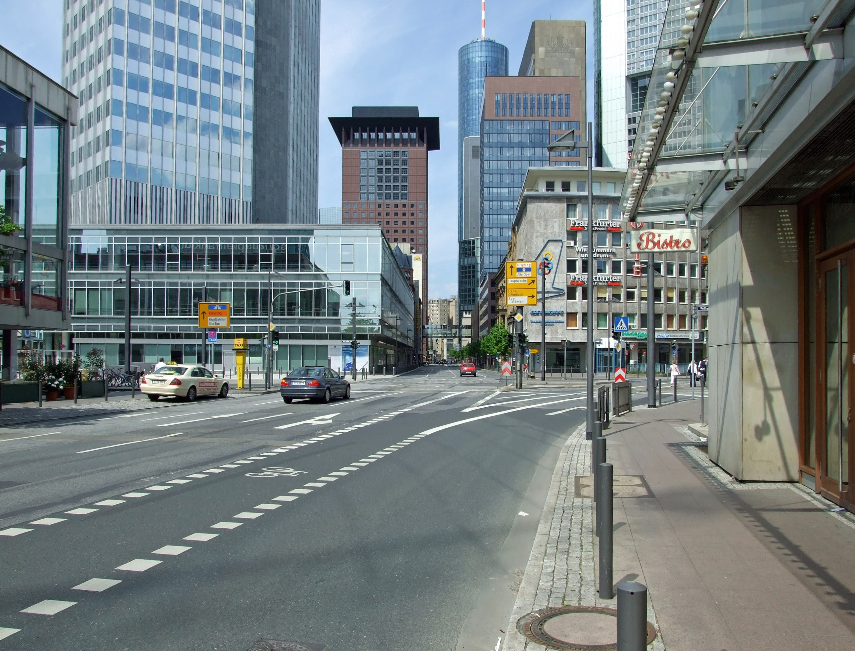 Neue Mainzer Strasse, vom „Willy-Brandt-Platz“ (Schauspiel, EZB) über die Kreuzungen Kaiserstrasse und Taunustor/Grosse Gallusstrasse (Japancenter) bis zur Kurve vor der Kreuzung Junghofstrasse, in Ffm